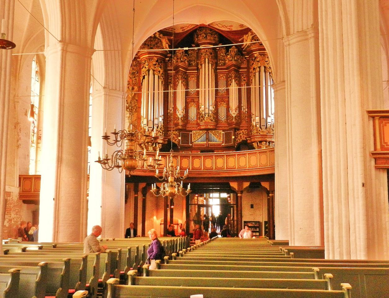 St. Wilhadi, Stade, Westempore